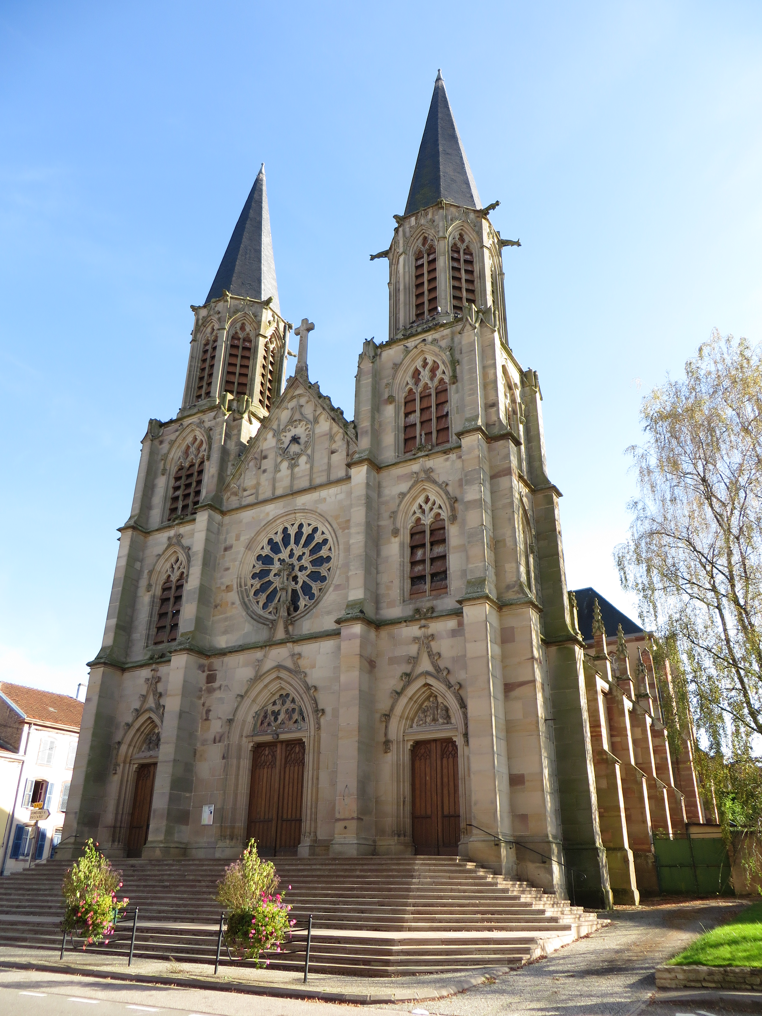 Blamont eglise